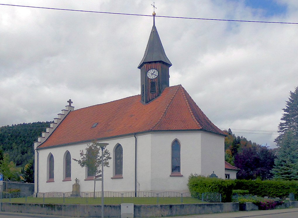 Kirche St. Gallus in Zimmern, Gemeinde Immendingen